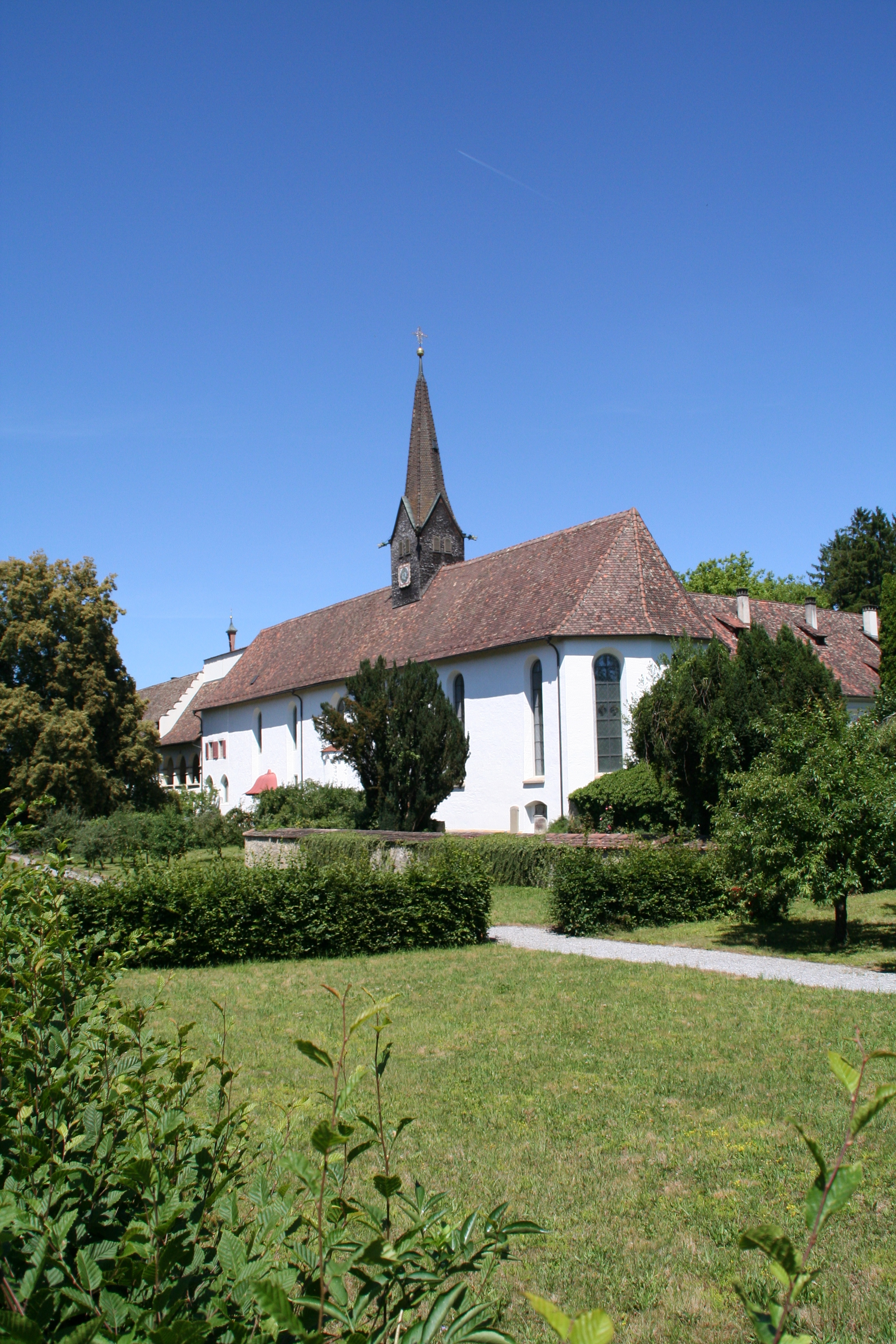 Klostergut Paradies